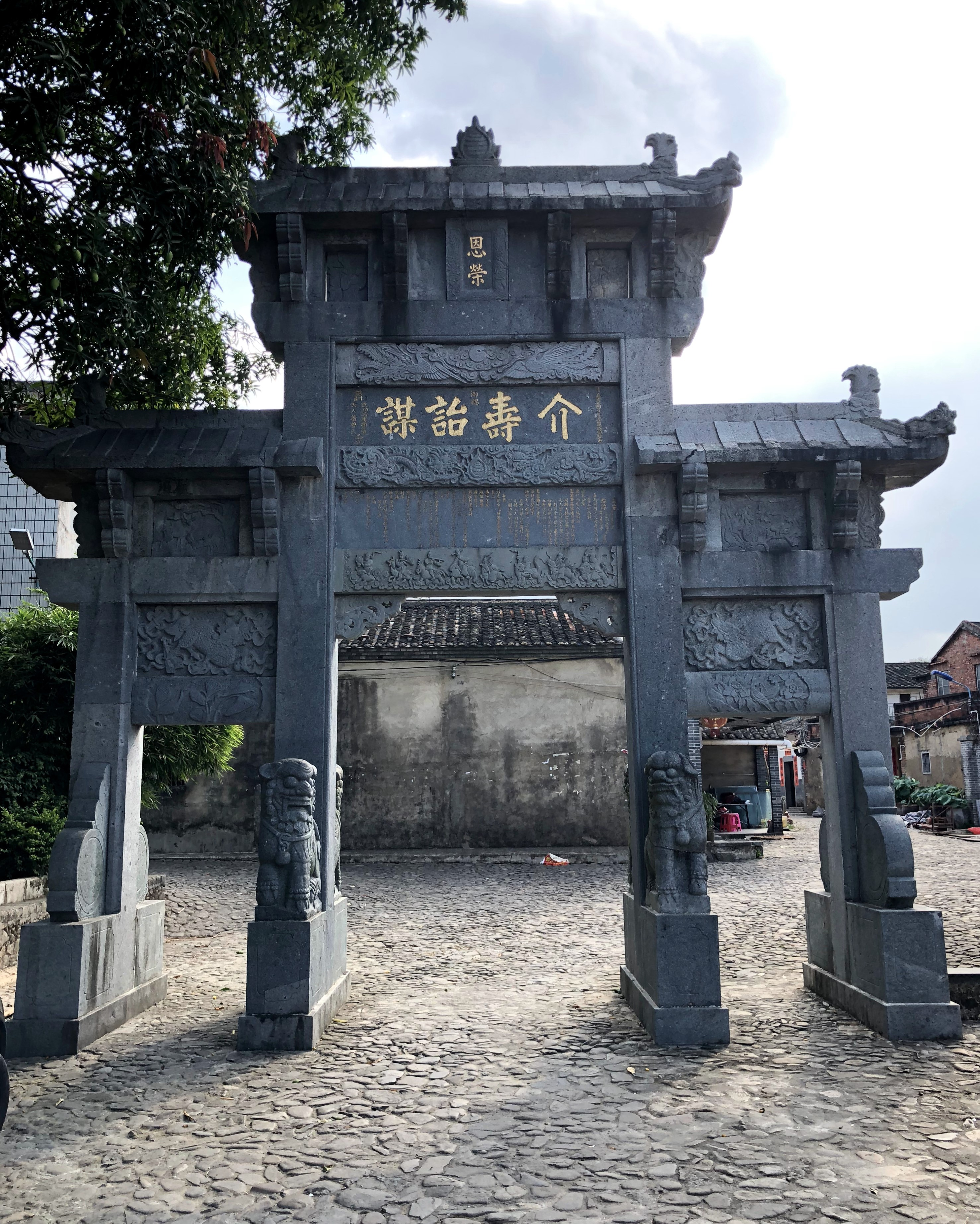 介寿诒谋牌坊。背面。